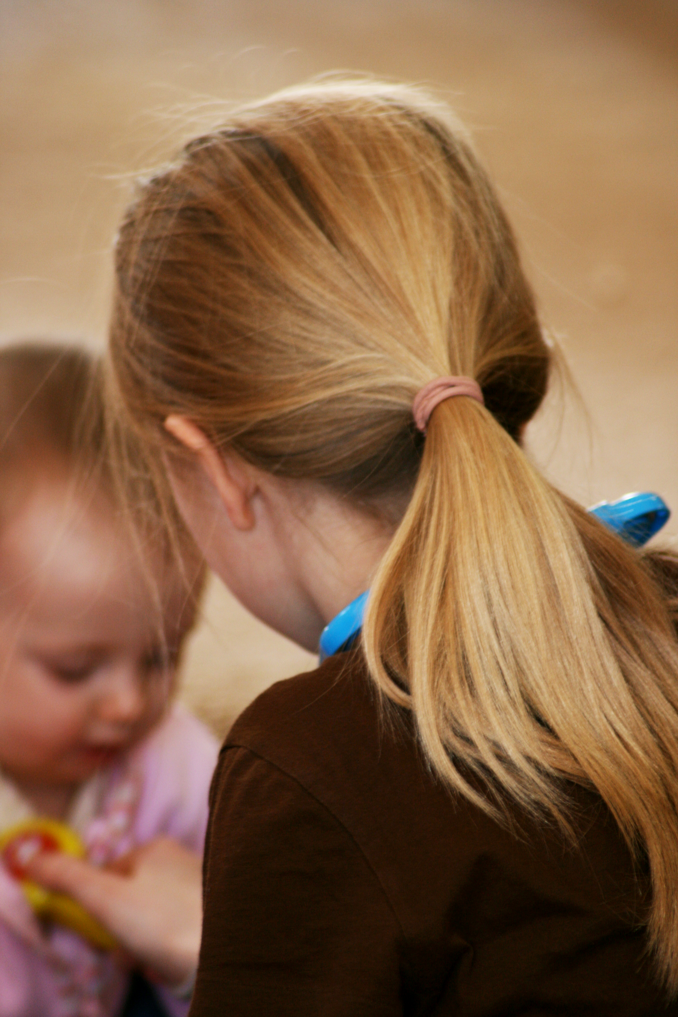 Ponytail